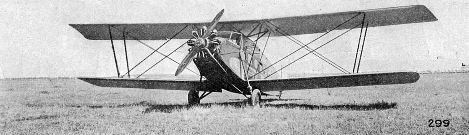 Aero A-38